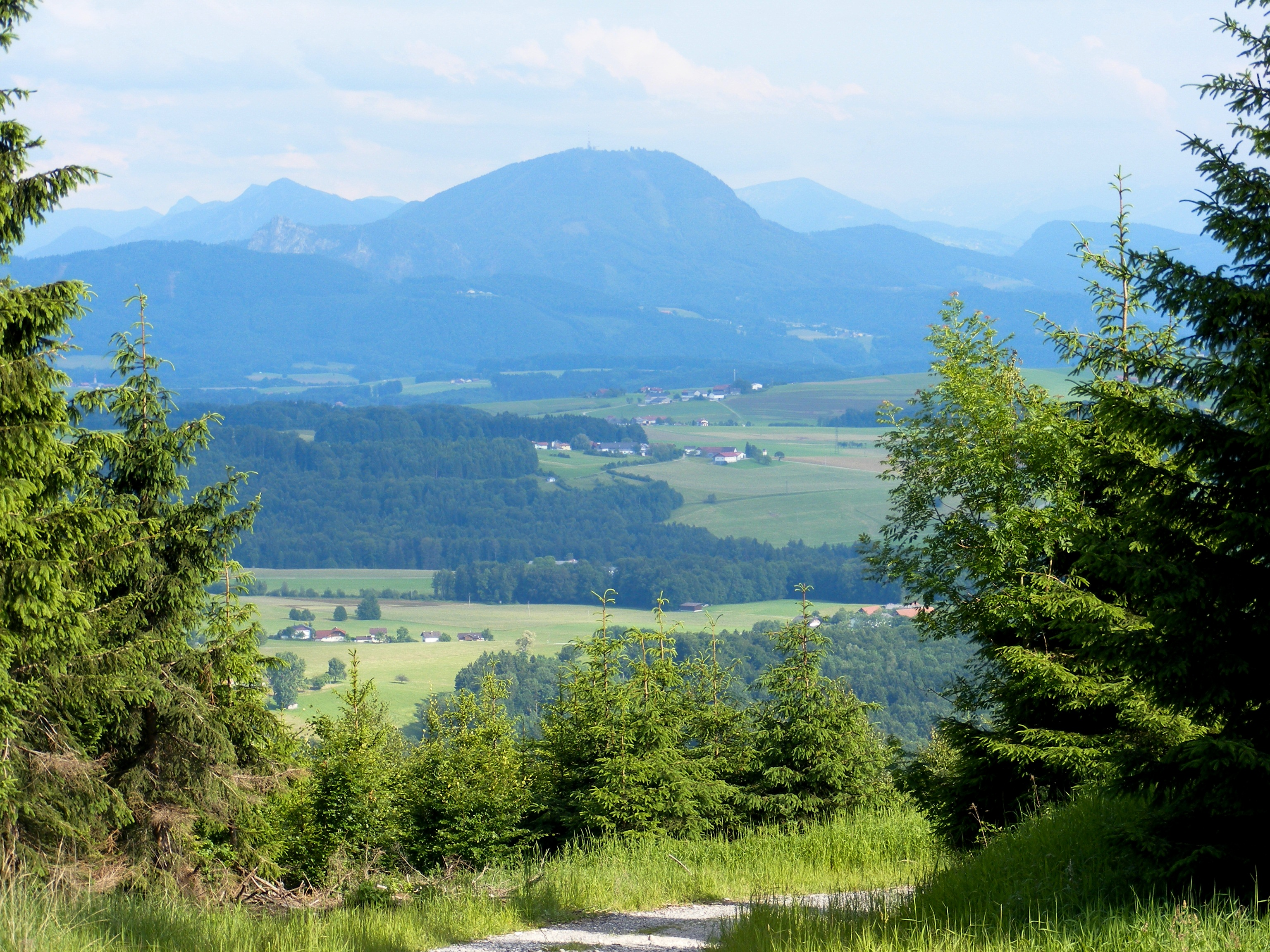 Blick vom Haunsberg Richtung Süden zum Gaisberg; im Vordergrund das Gemeindegebiet von Anthering.